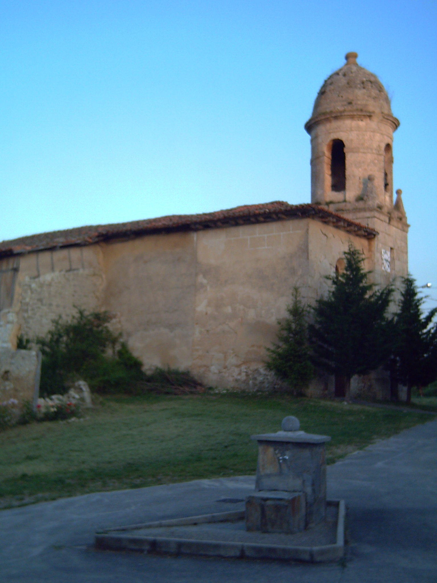 Fuente e Iglesia de Villalmondar